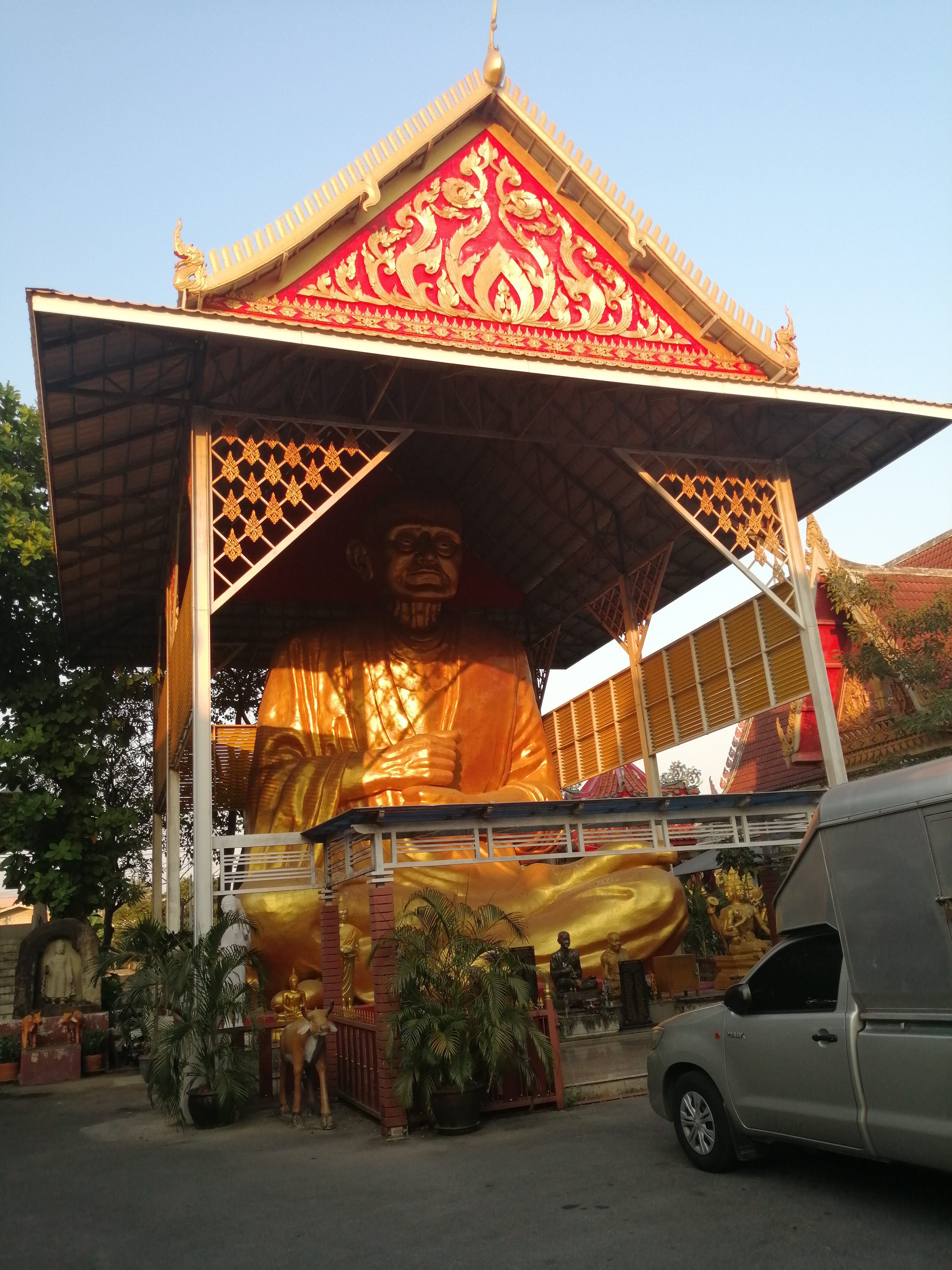 สมเด็จพระพุฒาจารย์ โต พรหมรังสี องค์ใหญ่